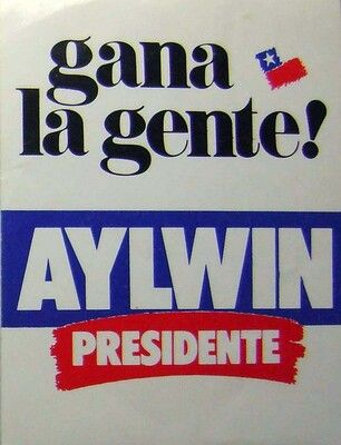 Afiche de Campaña de Patricio Aylwin, durante la elección presidencial de 1989.